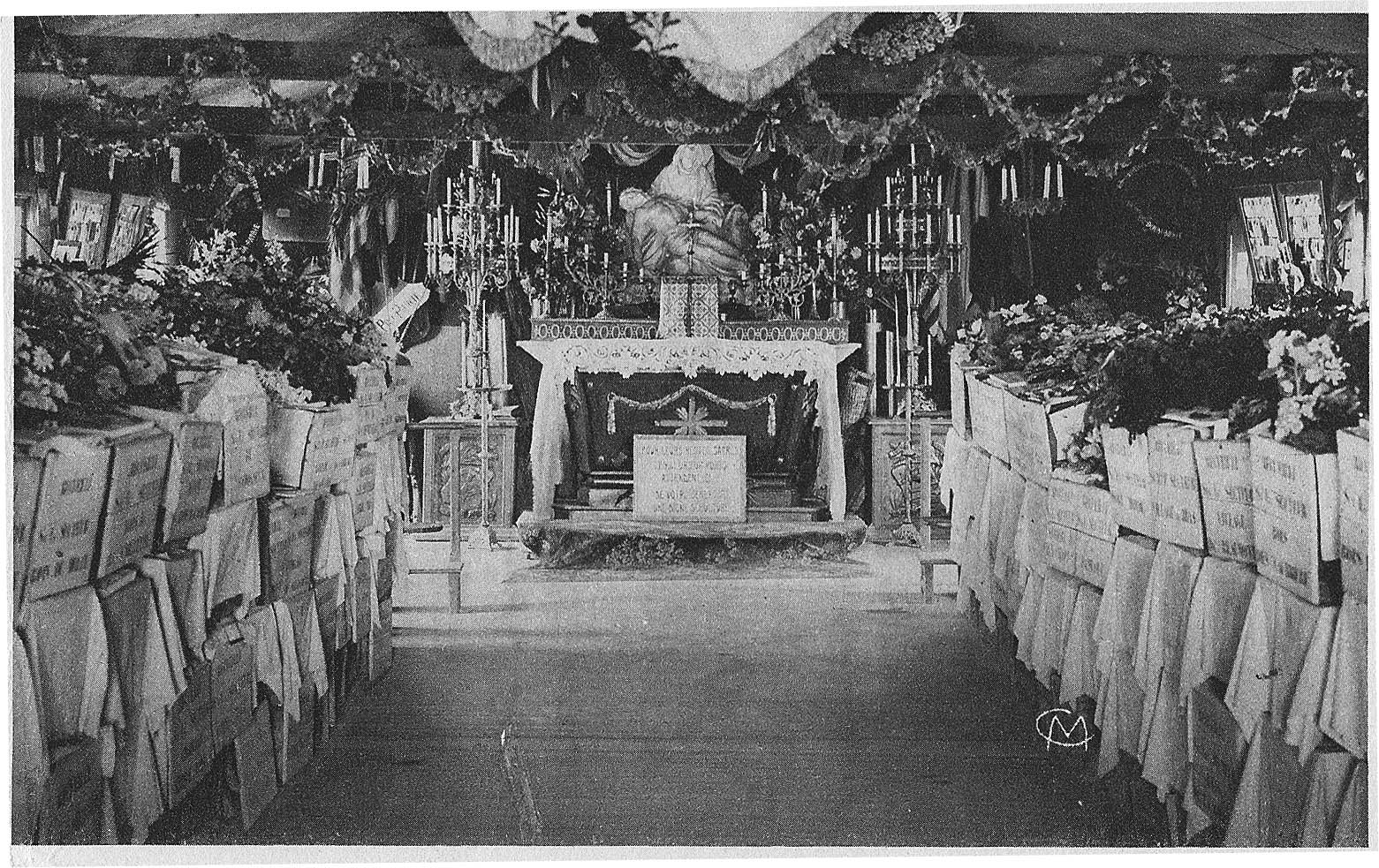 Une vue de l'ossuaire provisoire à Douaumont. Carte postale.